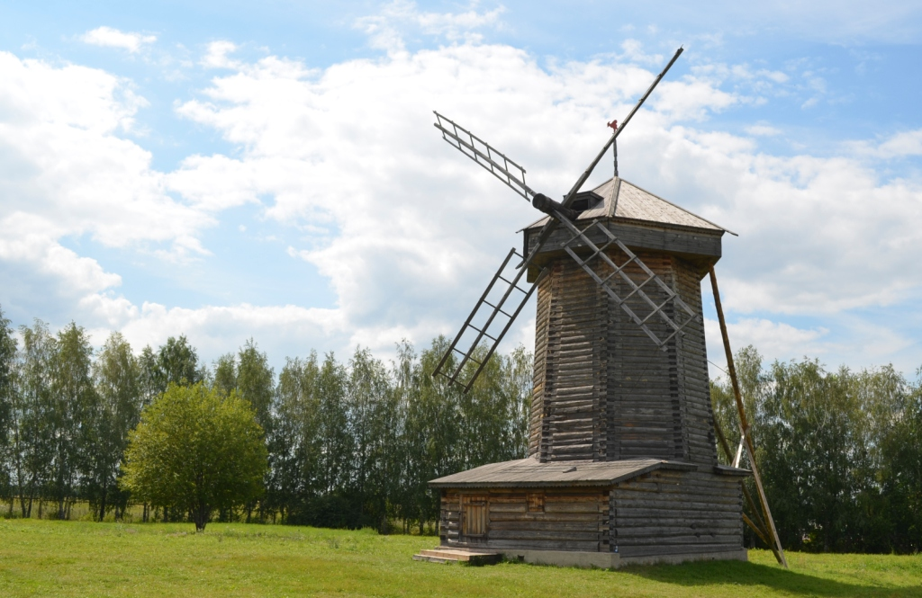 Smock mill in Suzdal Wooden architecture museum (2012).